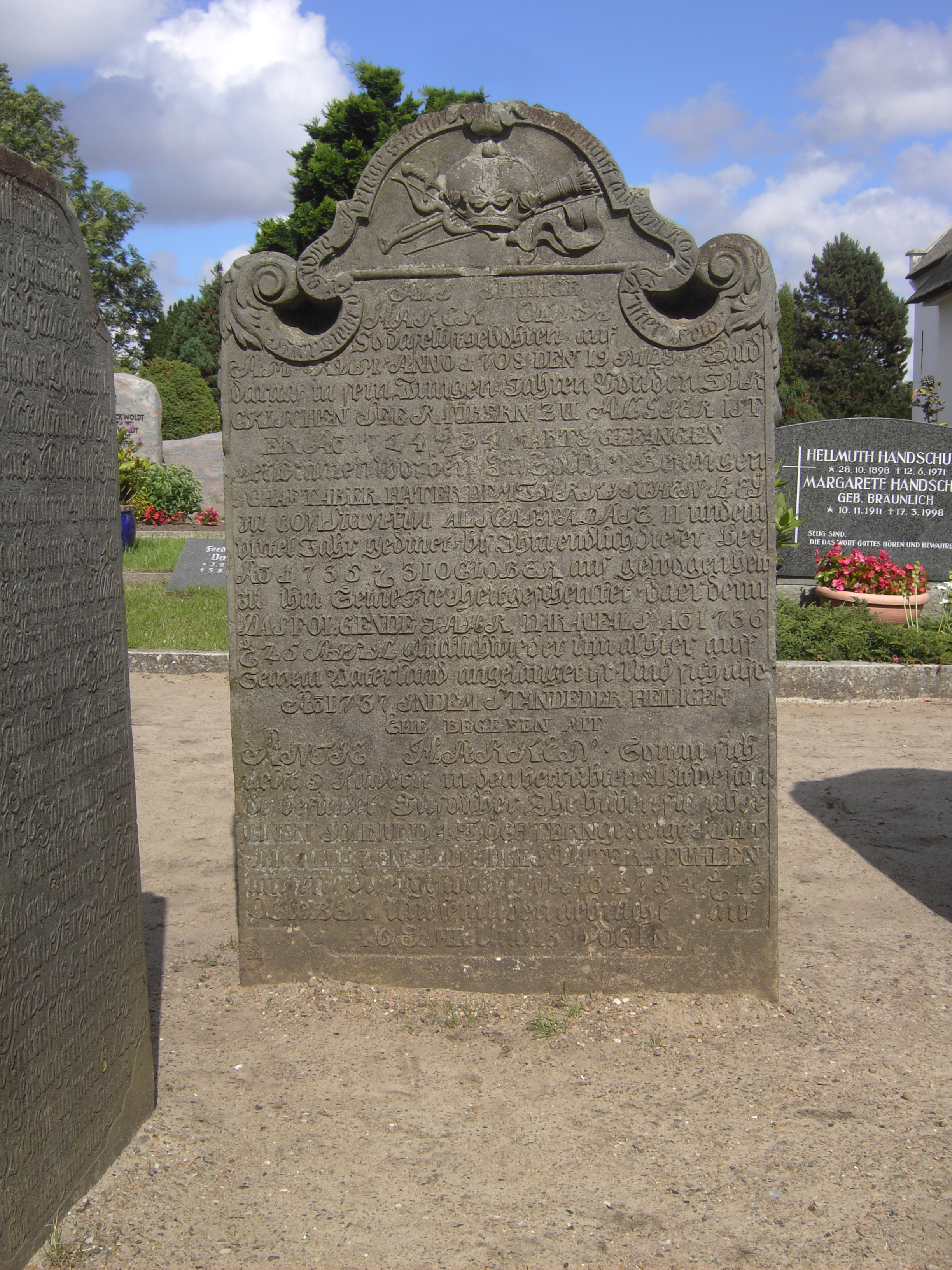 Grabstein von Hark Olufs, Nebel, Amrum, Deutschland